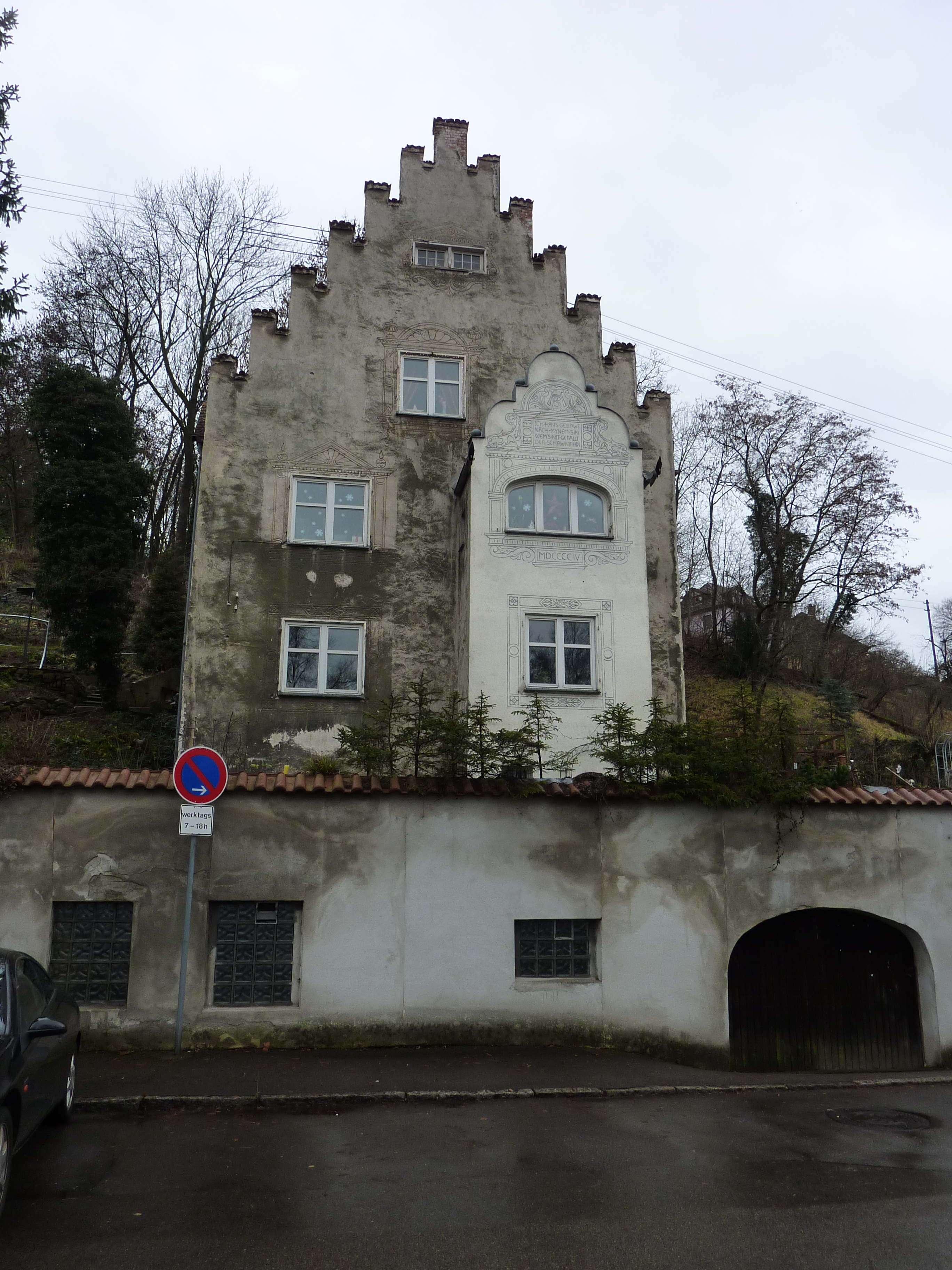 Berkheimer Straße 32, Esslingen. Von Albert Benz 1904 für sich selbst errichtet.